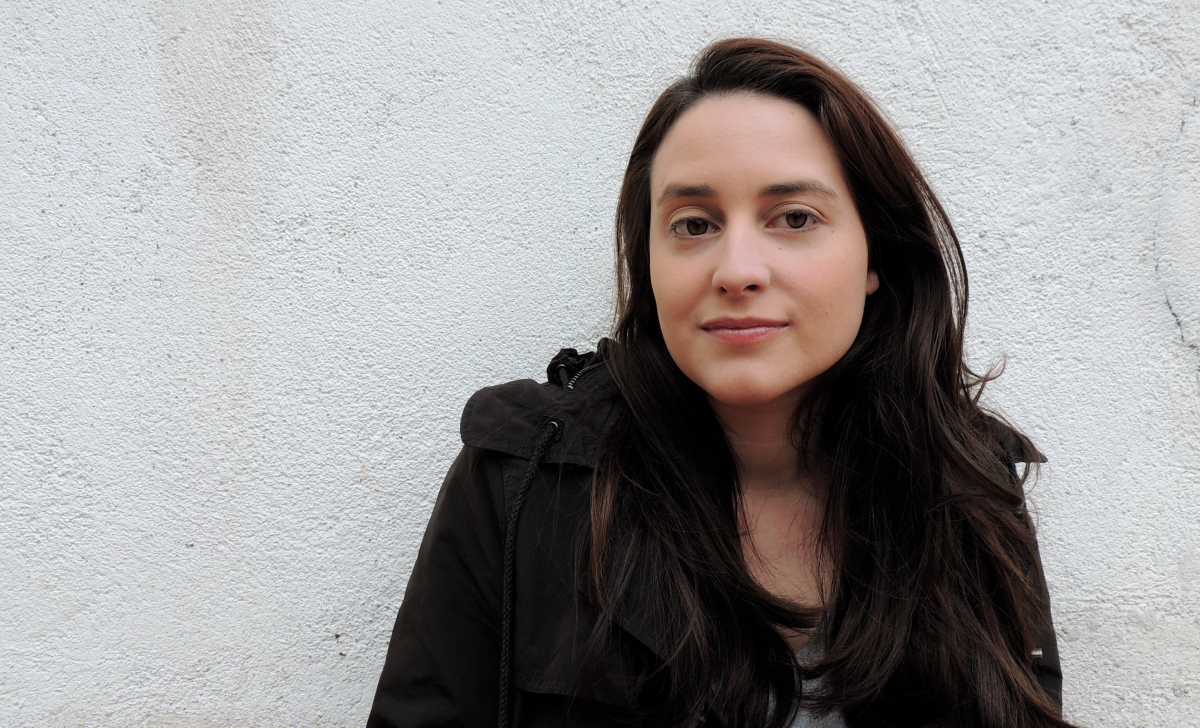 Berta Dávila escritora galega nunha entrevista.